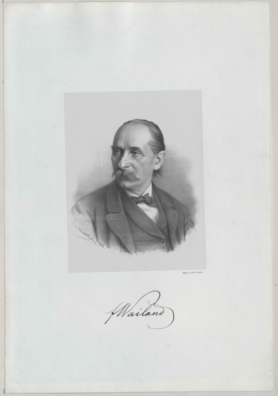 Portrait von Friedrich Wailand mit Autgraph, Portraitsammlung der Österreichischen Nationalbibliothek